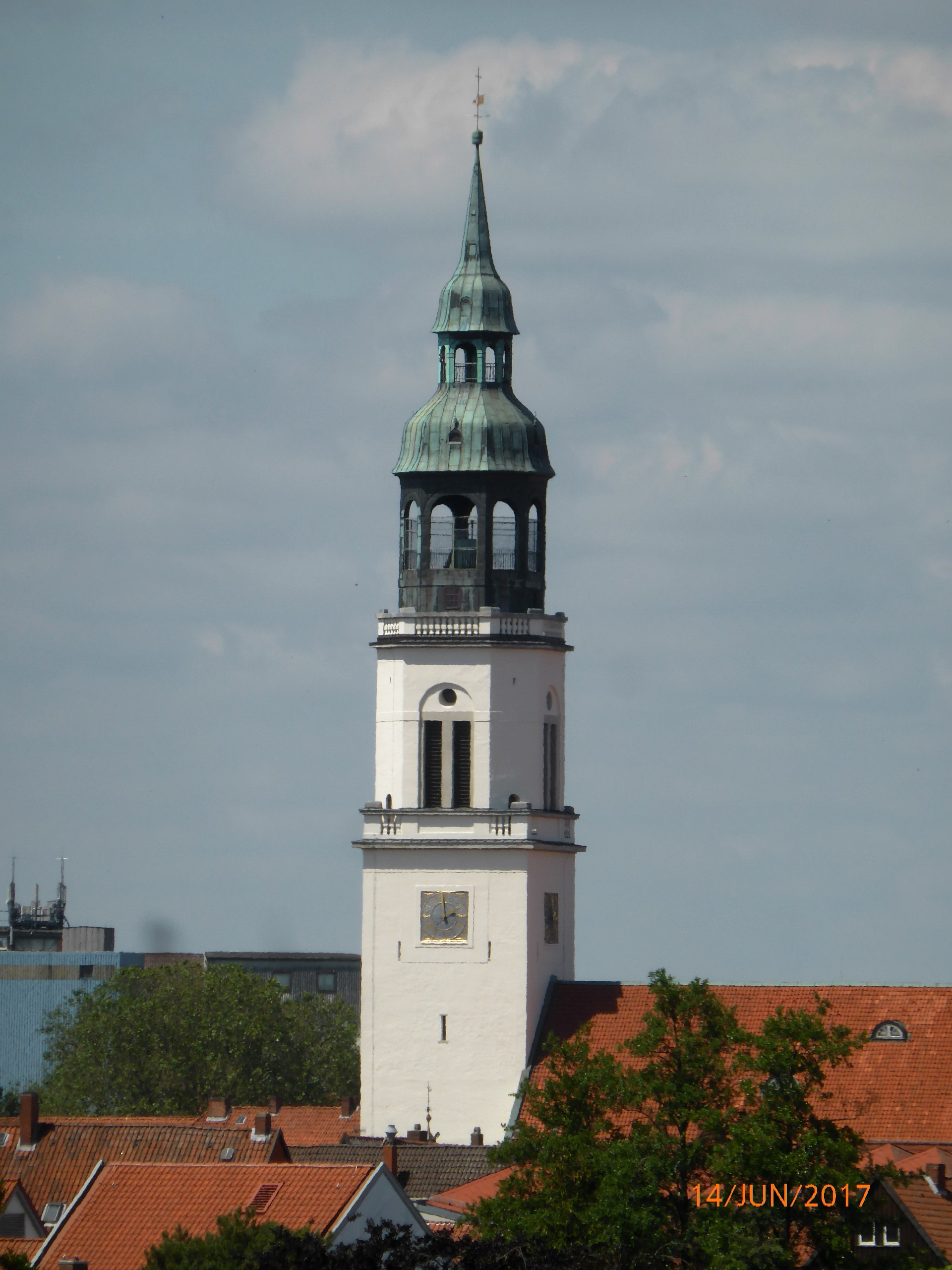 Celle, Stadtkirchturm. Blick vom Dach des Neuen Rathauses aus.